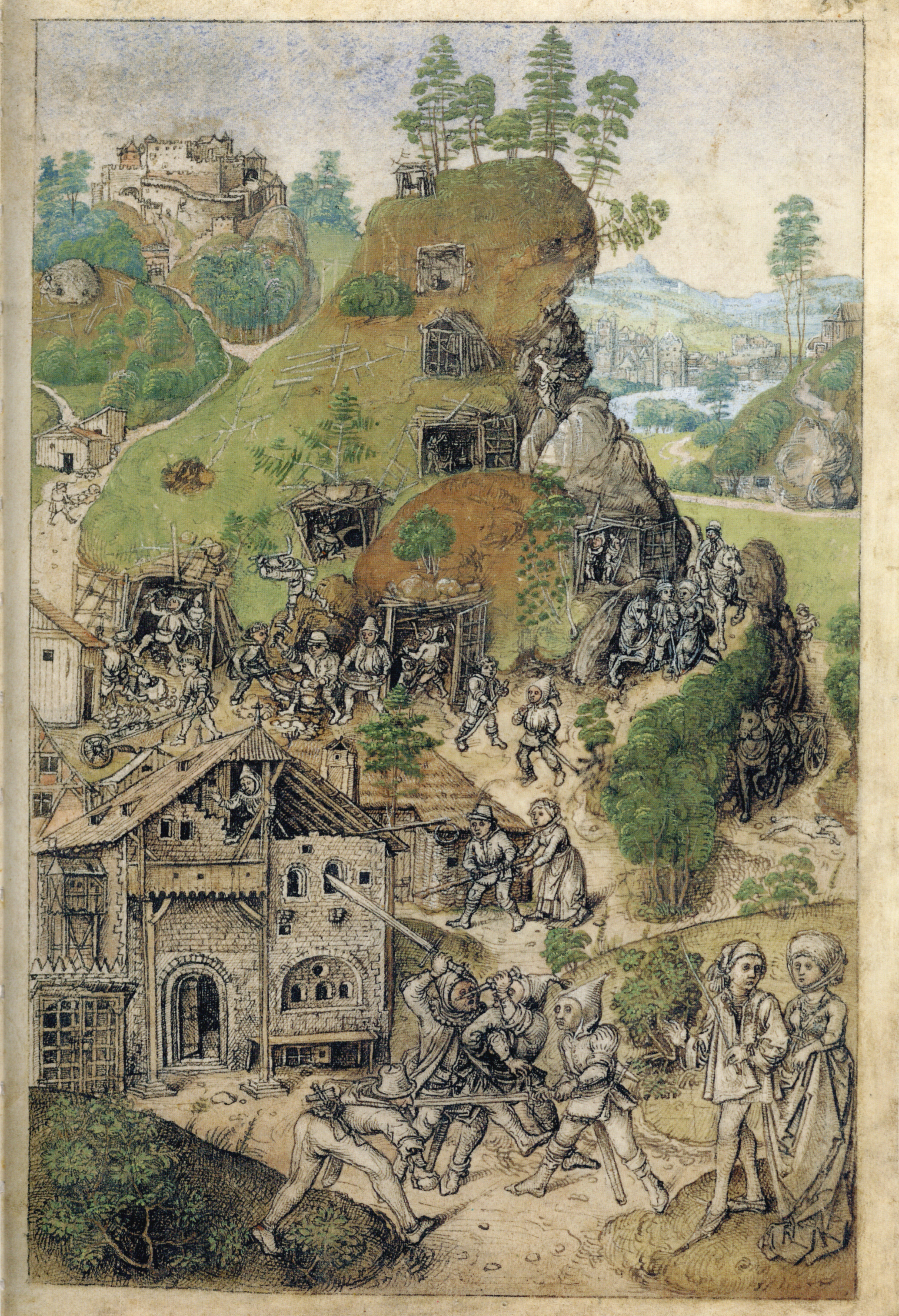 Mittelalterliches Hausbuch von Schloss Wolfegg Fol. 35r: Bergwerkspanorama